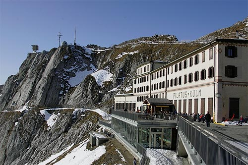 Pilatus-Kulm (Nr. 04.M-2817)